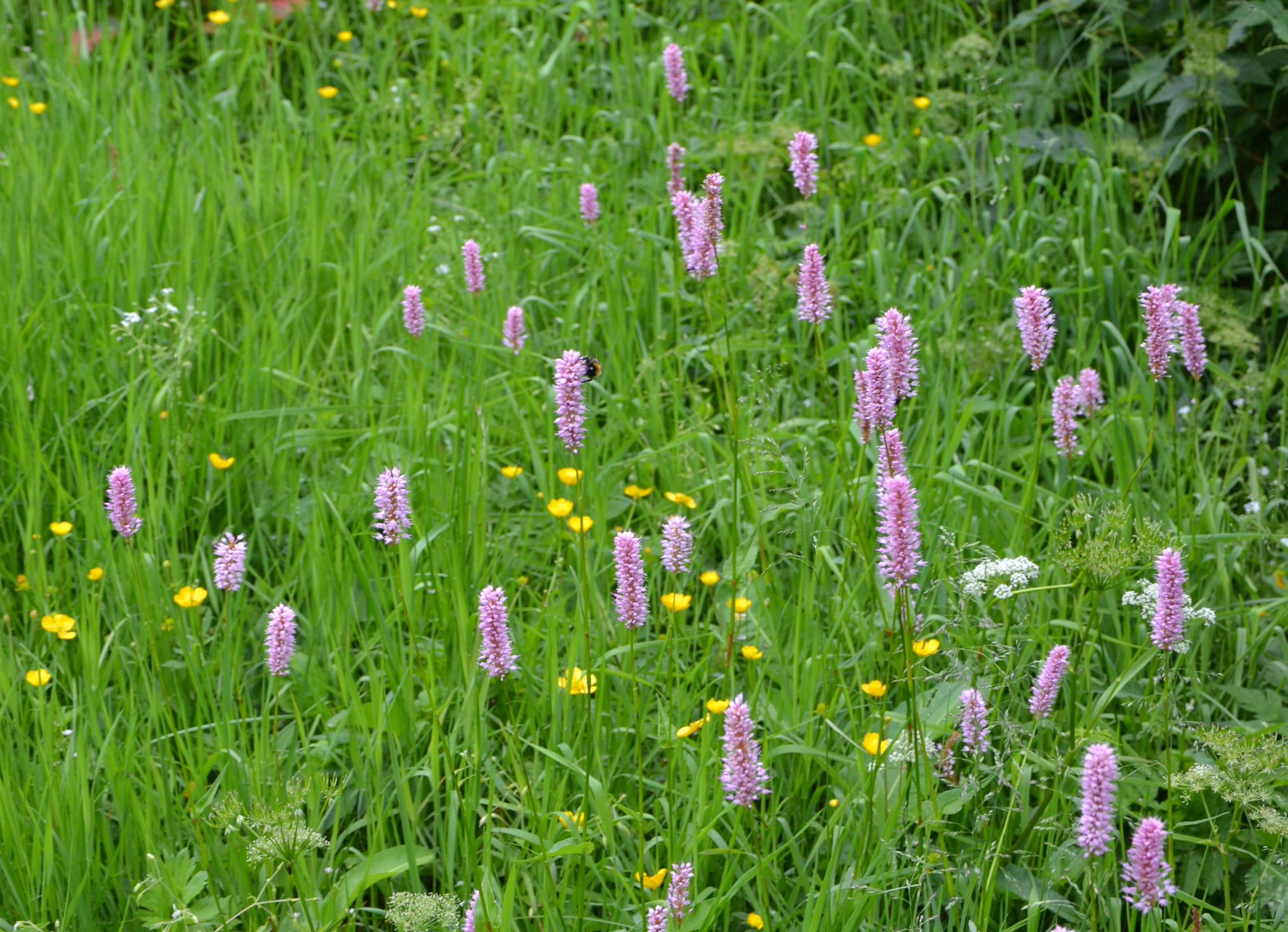 Renouée bistorte (Bistorta officinalis), La Bresse, Vosges.